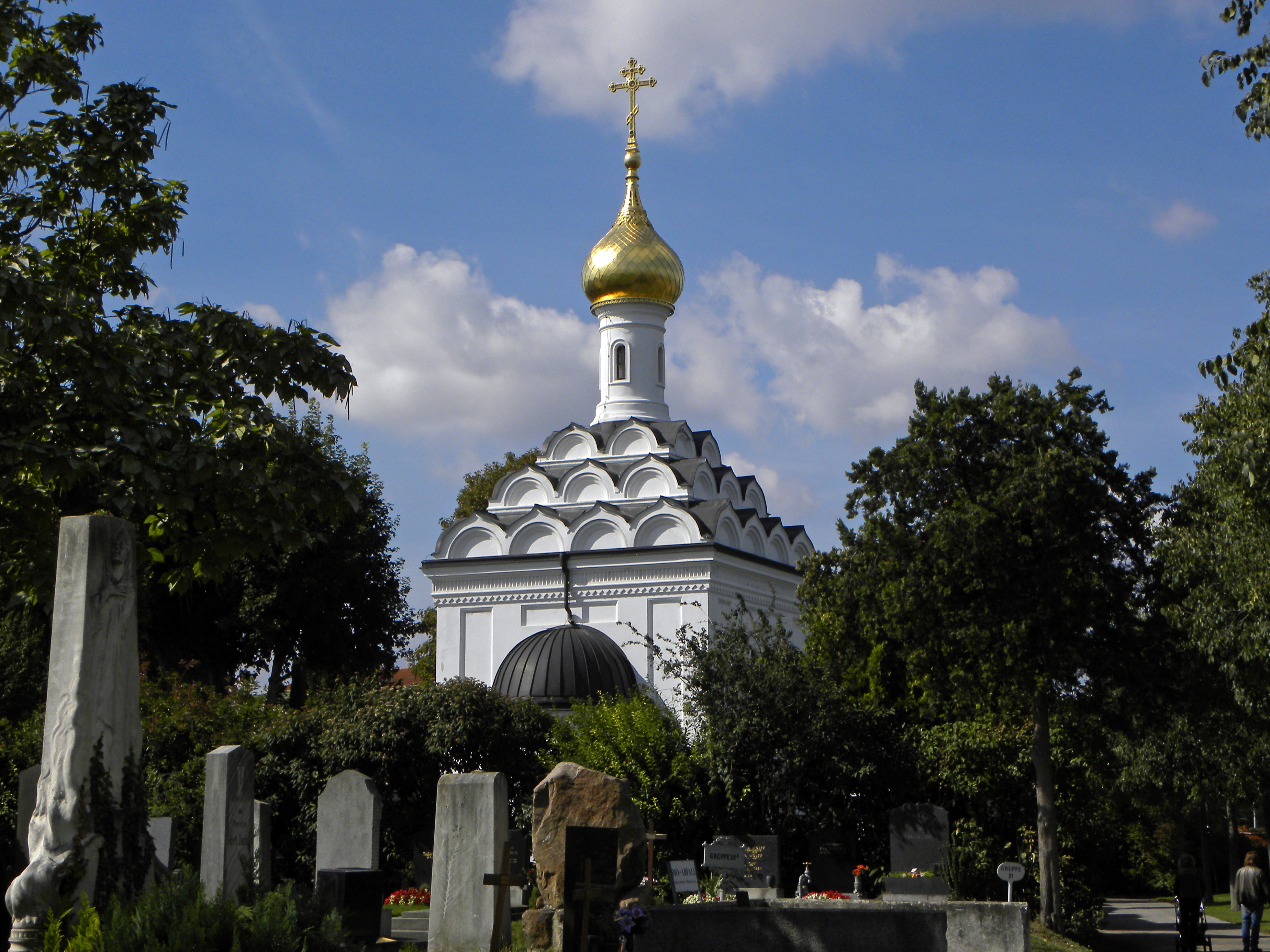 Gesamtanlage, Zentralfriedhof